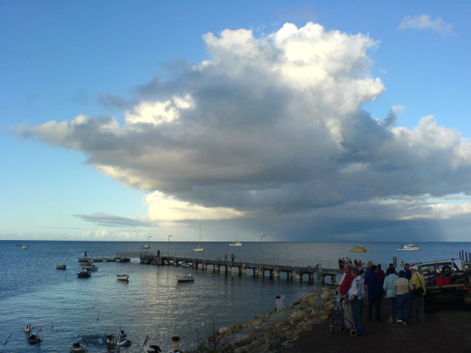 Kingscote, Kangaroo Island, Australie, la jetée et les pélicans